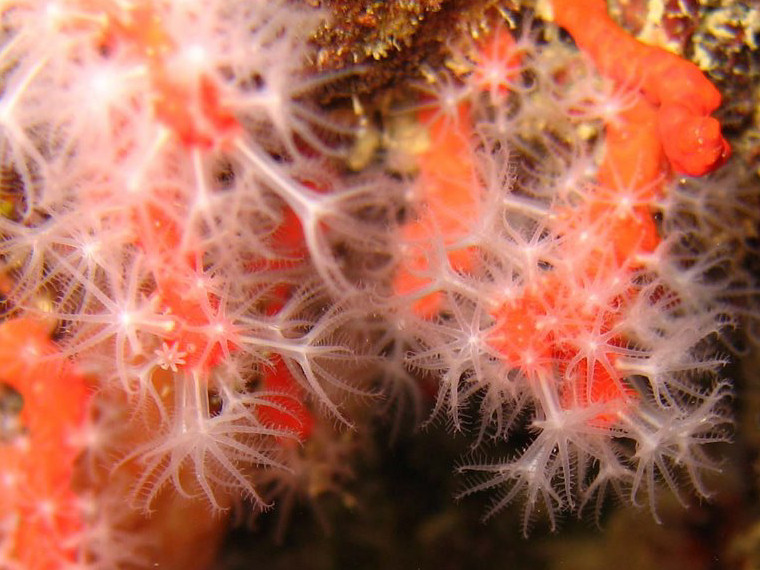 Particolare dei polipi di Corallium rubrum, tratta da questa foto (Immersione subacquea notturna a Calafuria)